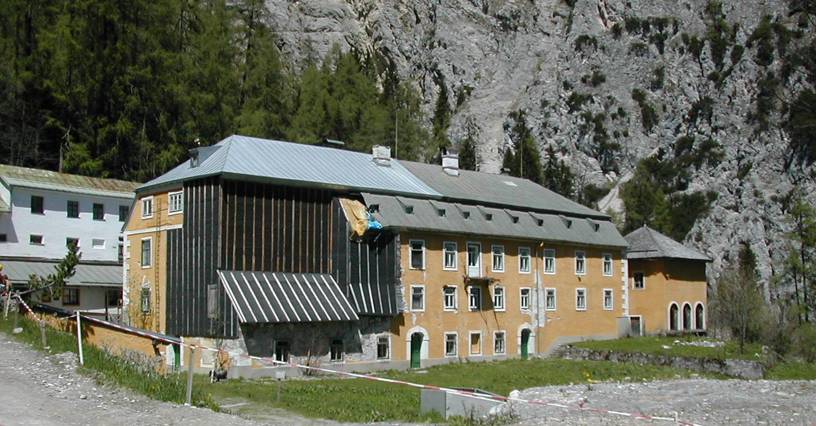 Herrenhäuser im Halltal bei Hall in Tirol, Österreich.